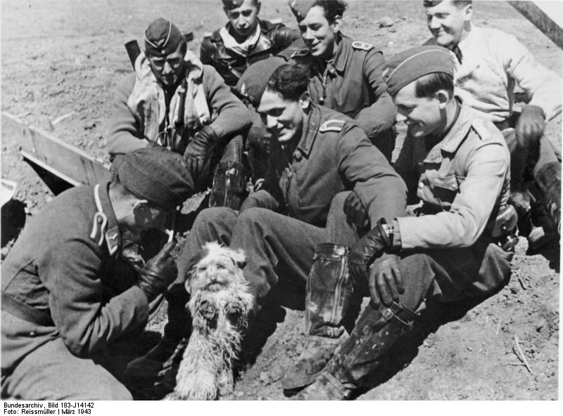 Jagdflieger Günther Rall mit Kameraden "Wie spricht Rata?" Eichenlaubträger Hauptmann Rall und die Männer seiner Jagdstaffel während einer kurzen Rast zwischen zwei Flügen mit dem Staffelhund, der "Rata" gerufen wird. 6.3.1943 [Herausgabedatum] Abgebildete Personen: Rall, Günther: Major, Ritterkreuz (RK), Luftwaffe, Generalleutnant, Inspekteur der Bundesluftwaffe, Bundesrepublik Deutschland (GND 124275990)